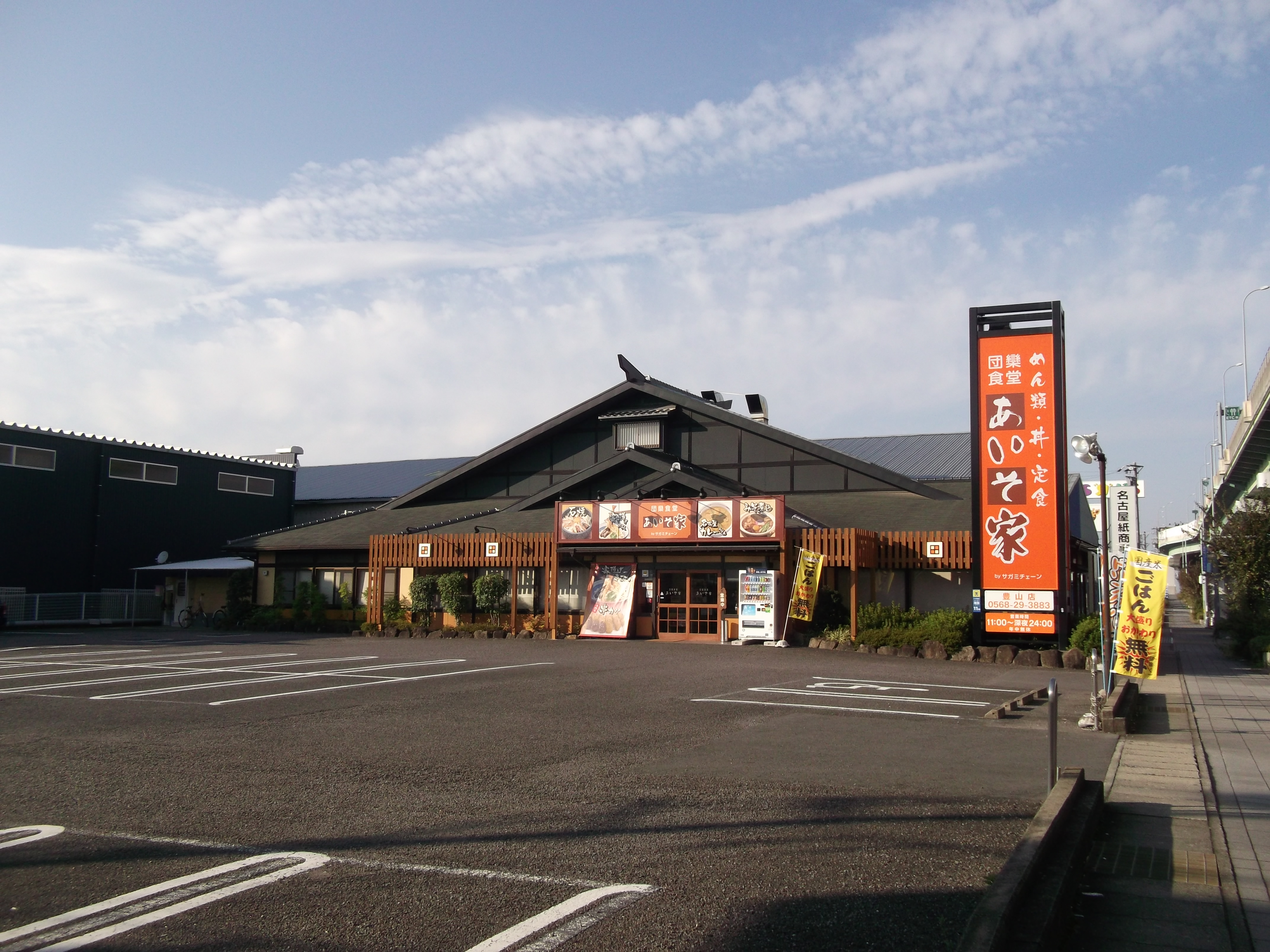 愛知県西春日井郡豊山町大字豊場字大山のあいそ家豊山店を東側公道南側より撮影